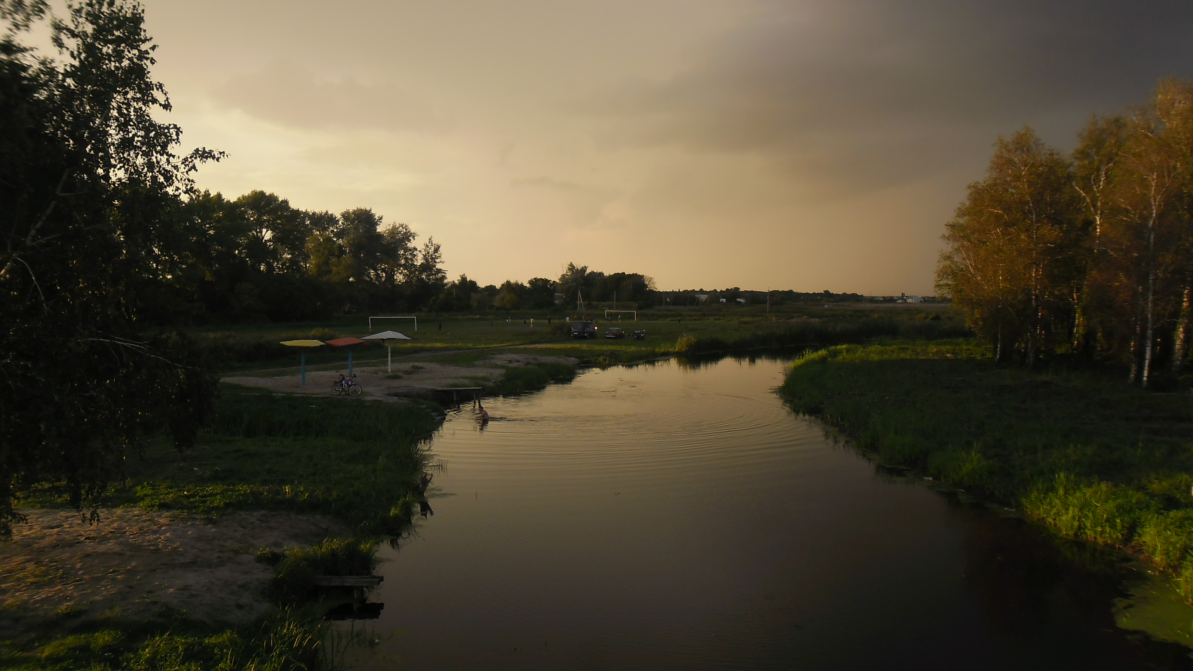 Річка Недра у центрі міста